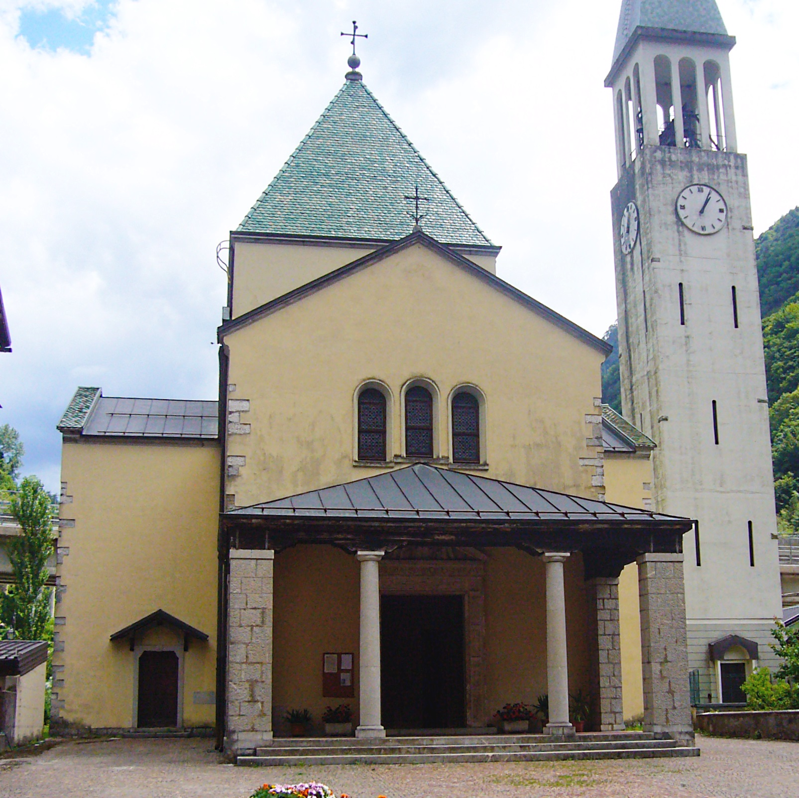 La chiesa parrocchiale di Dogna, risalente al XX secolo